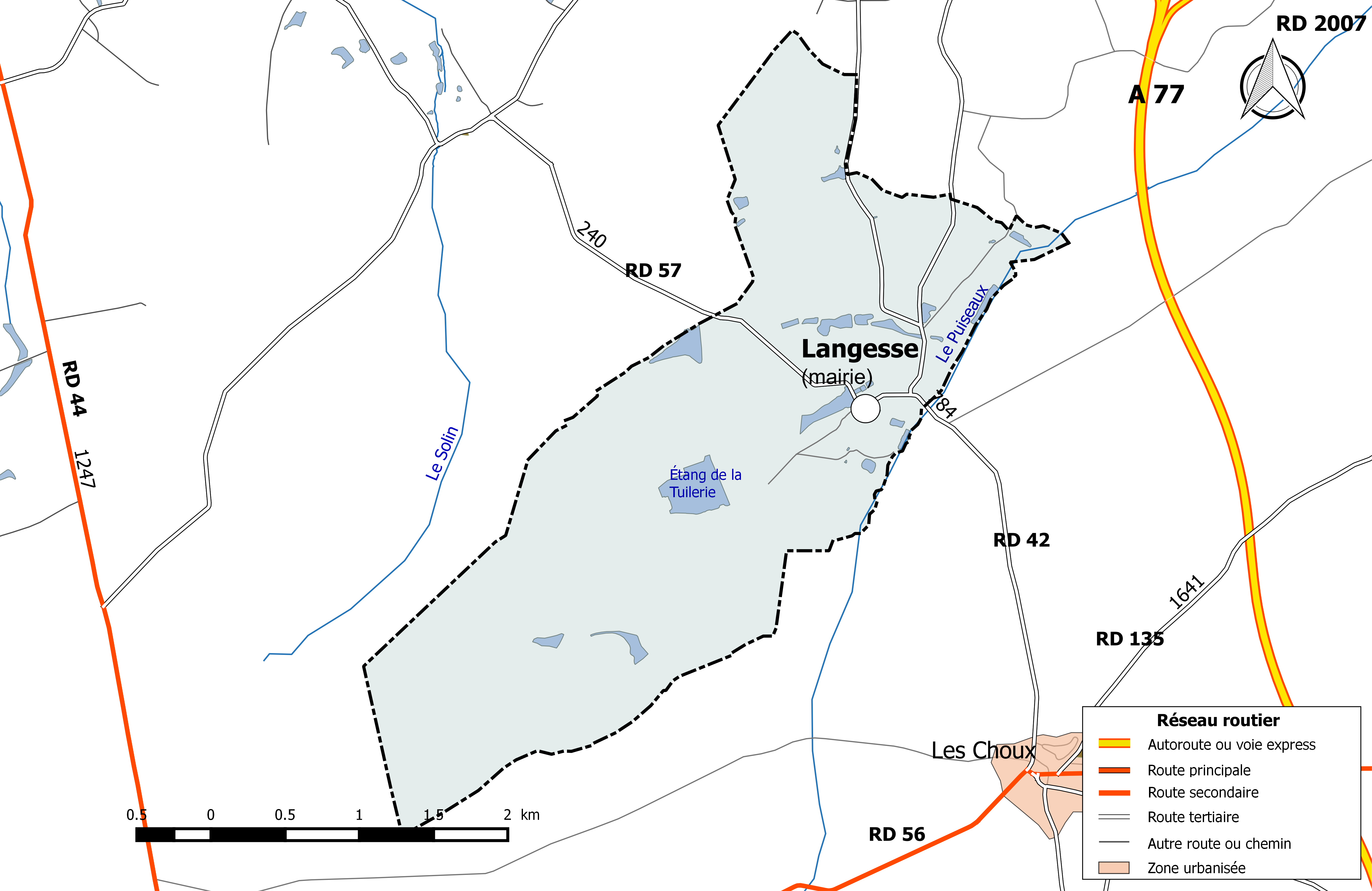 Carte du réseau routier de la commune de Langesse.